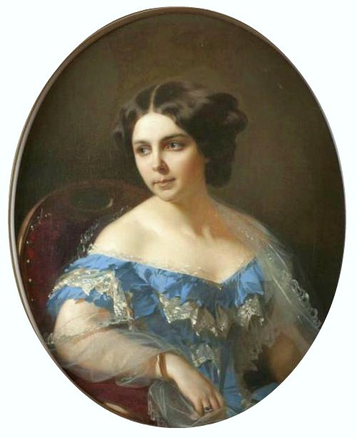 Ольга Павловна Стахович (1827-1902) дочь Павла Николаевича Ушакова (1779-1853) от брака с Софией Гавриловной Родзянко (1803-1877). С 1853 жена Александра Александровича Стаховича (1830-1913)